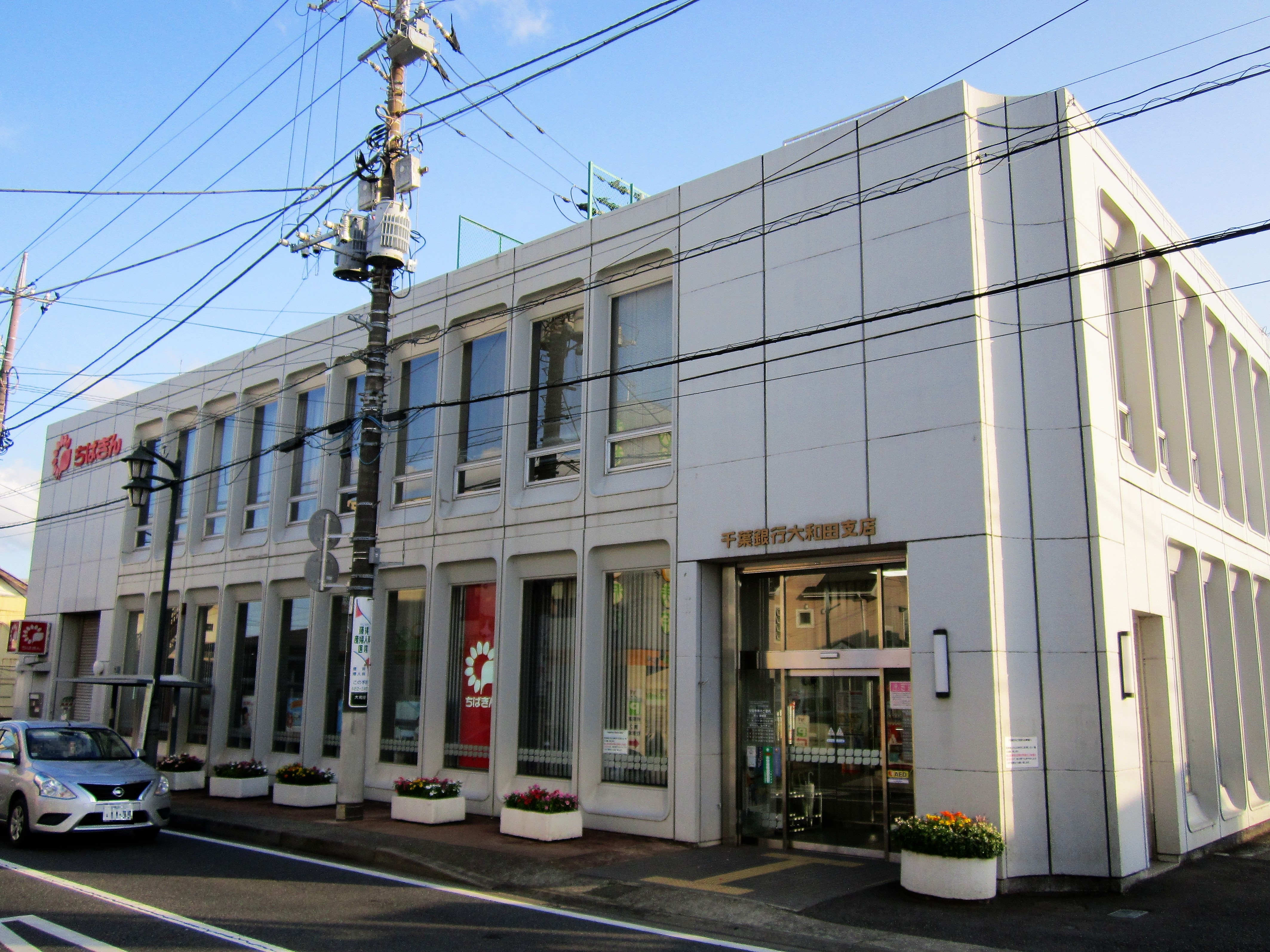 千葉銀行大和田支店（八千代市大和田）